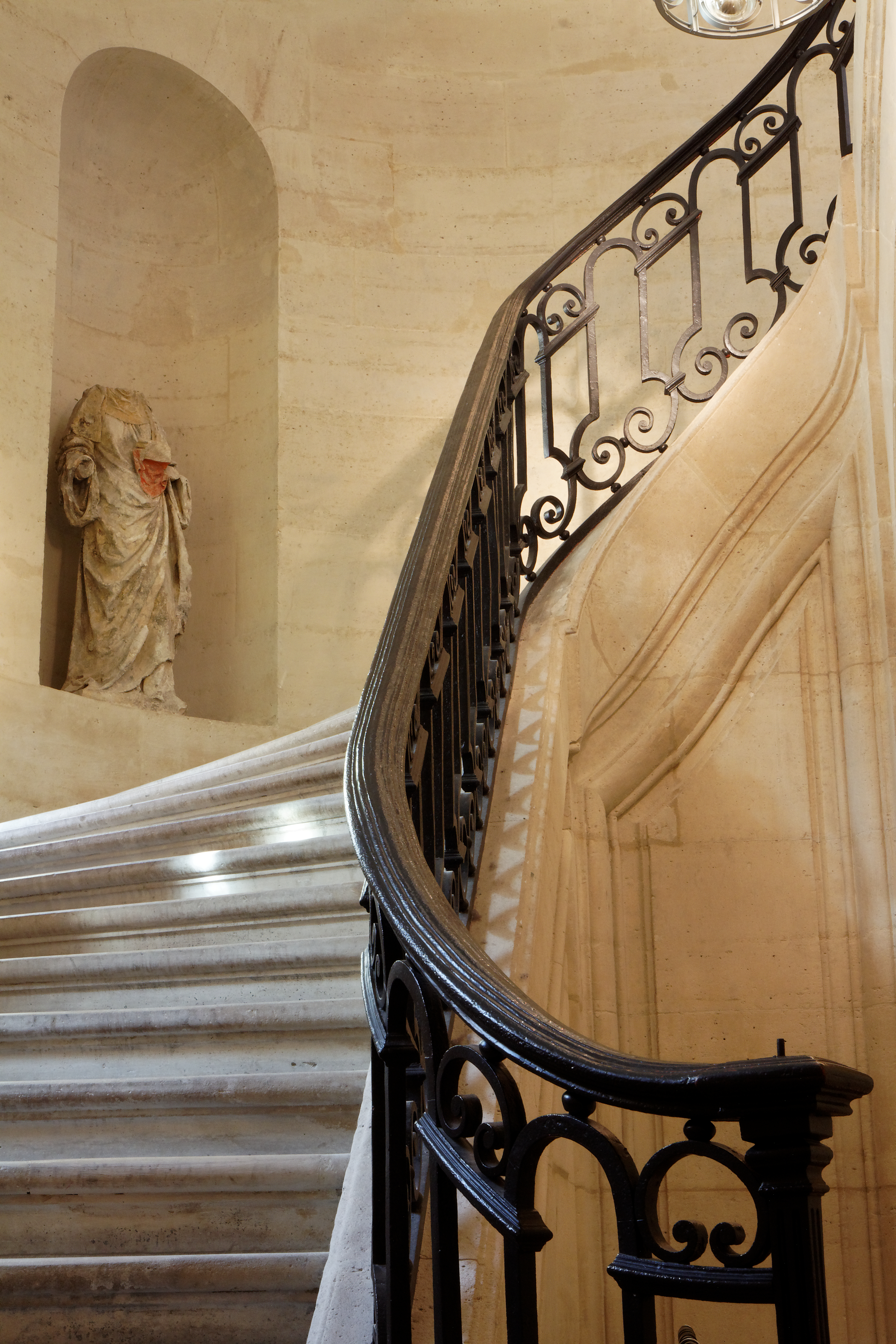 Une statue sans tête dans des escaliers au Bernardins. .